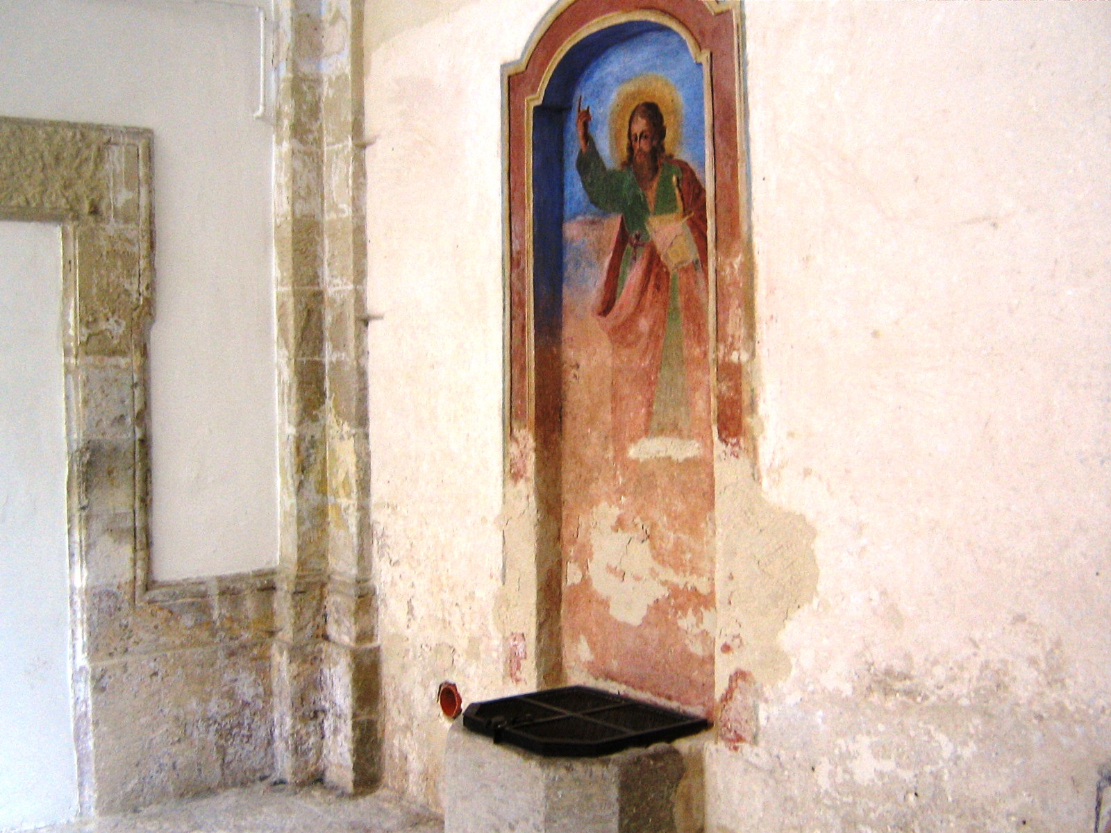 Pozzo di San Paolo Galatina